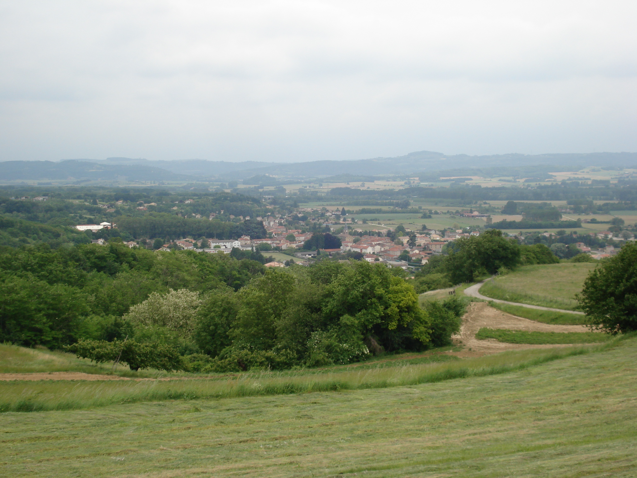 vue du village de Saint-Uze dans la Drôme depuis la chapelle Sainte-Euphémie